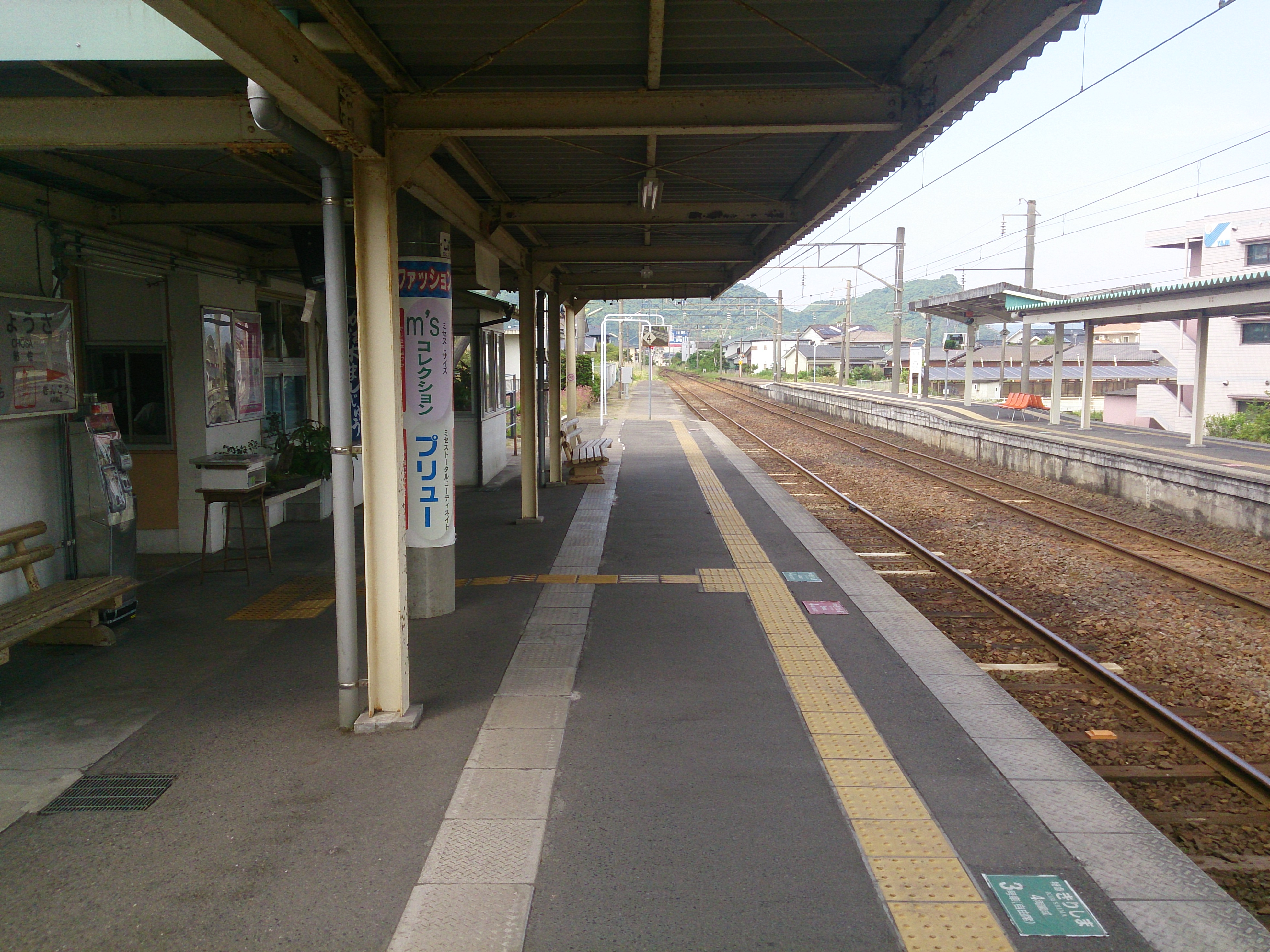 帖佐駅 ホーム（国分方）